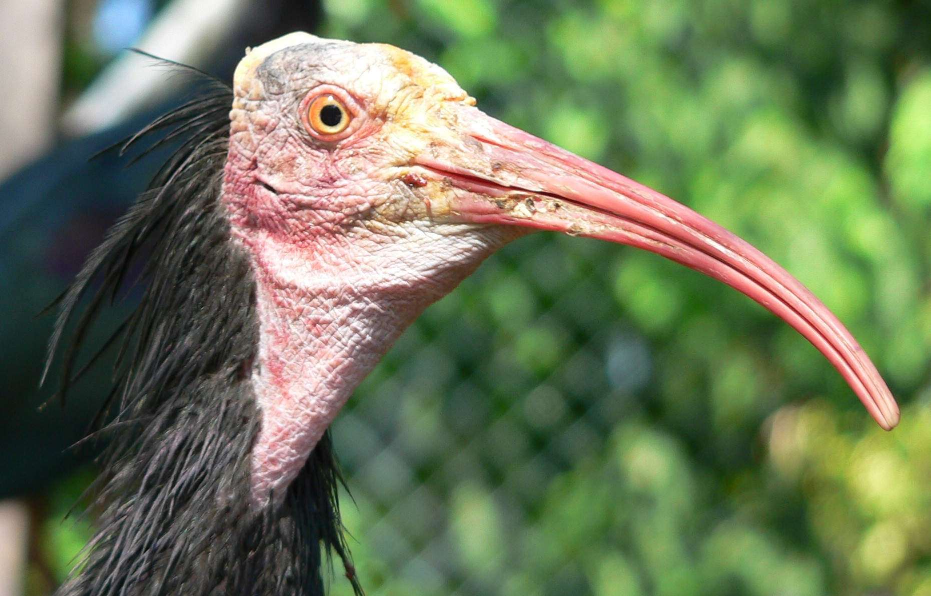 Geronticus eremita Mai 2005 Benutzer:Else